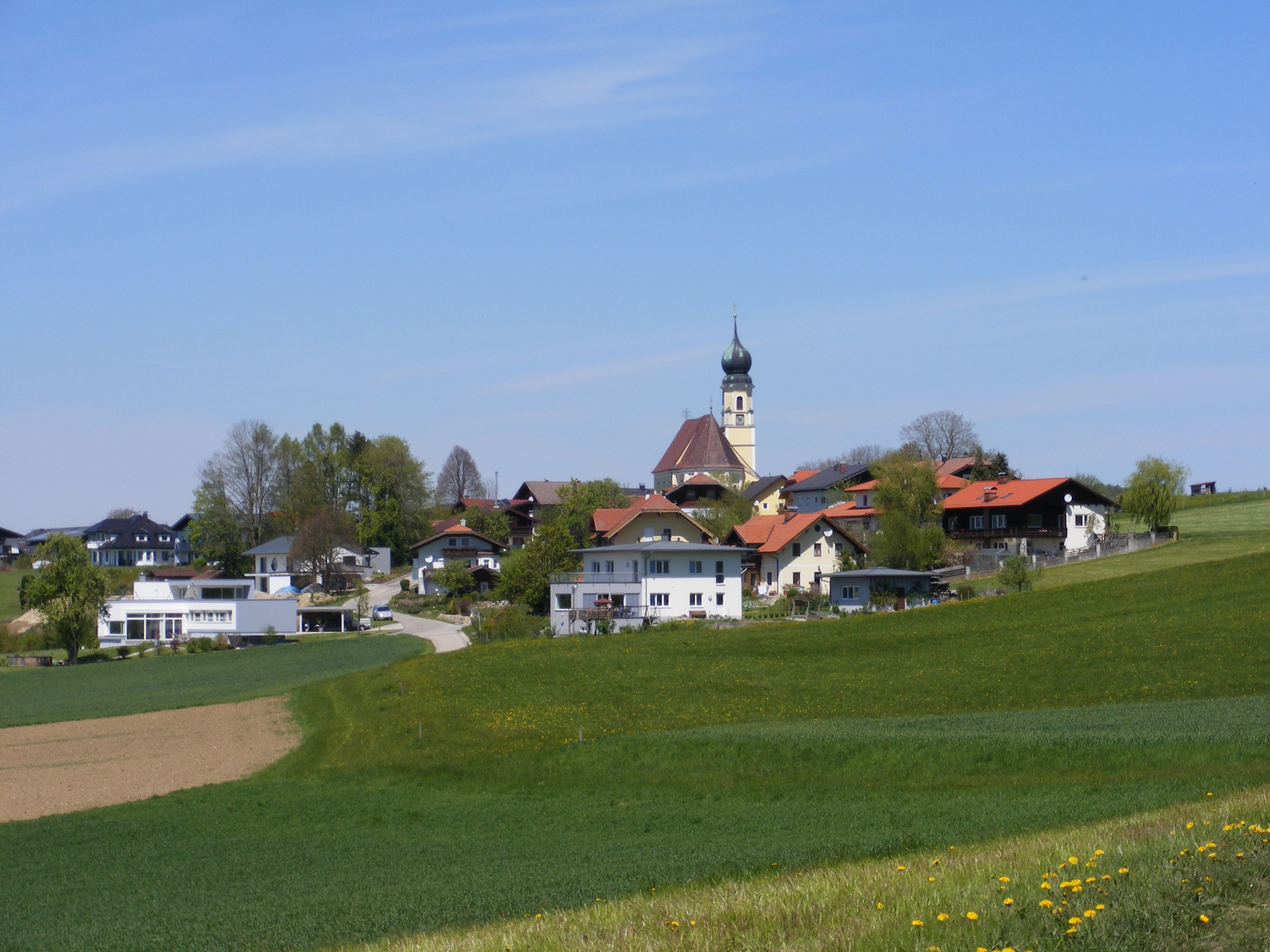 Der Ort Vormoos in der Innviertler Gemeinde Feldkirchen bei Mattighofen, Ansicht von Süden.